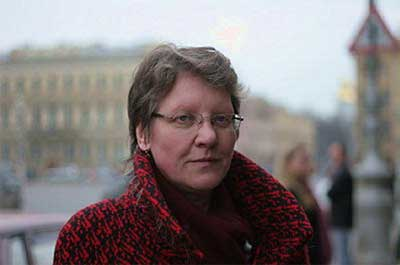 Maroussia Klimova